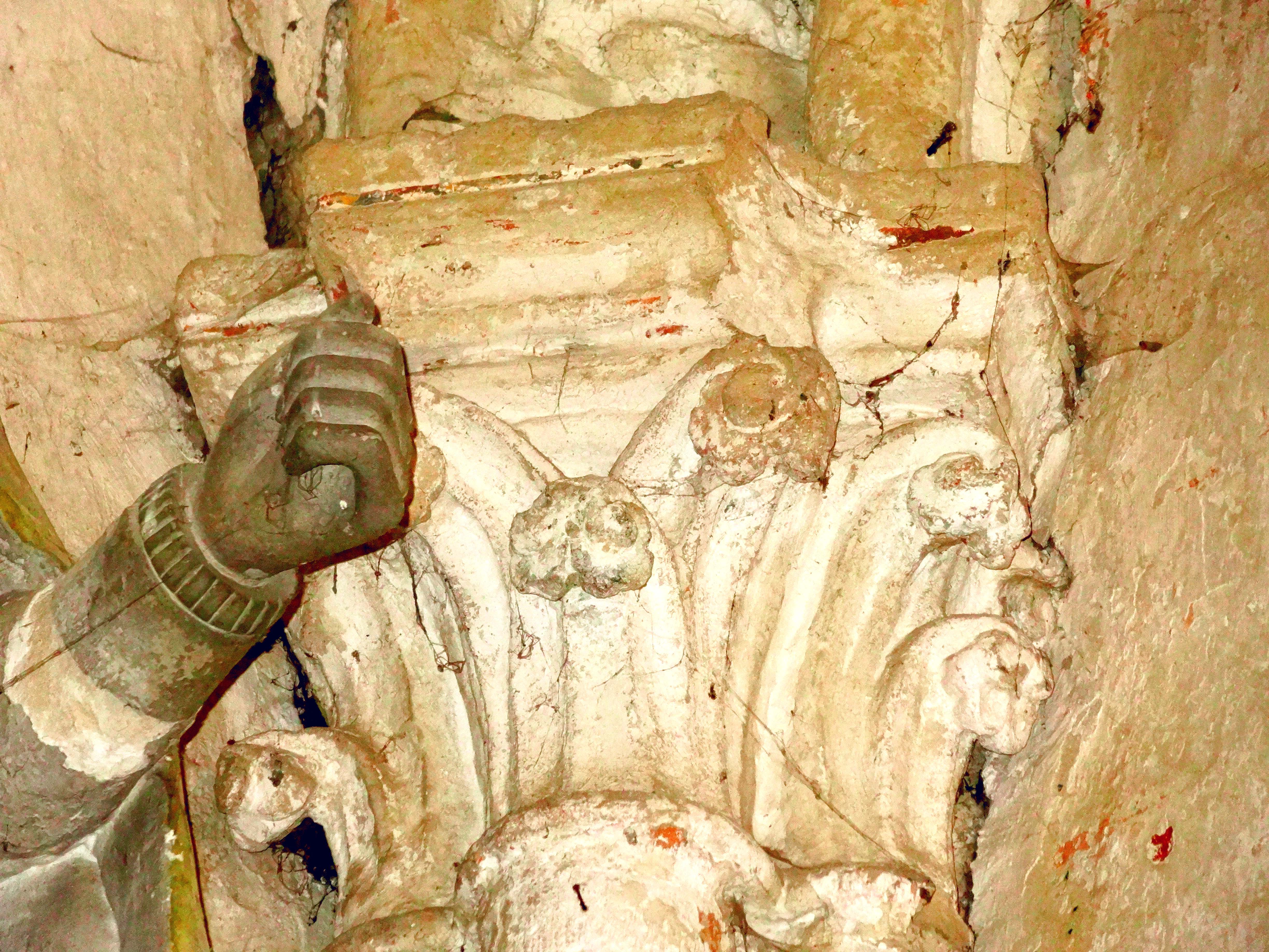 Chapiteaux de l'église - voir titre.